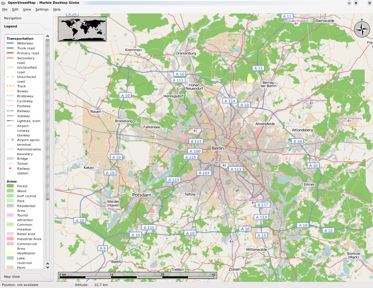 Screenshot des KDE-Computerprogramms Marble mit OpenStreetMap-Integration.